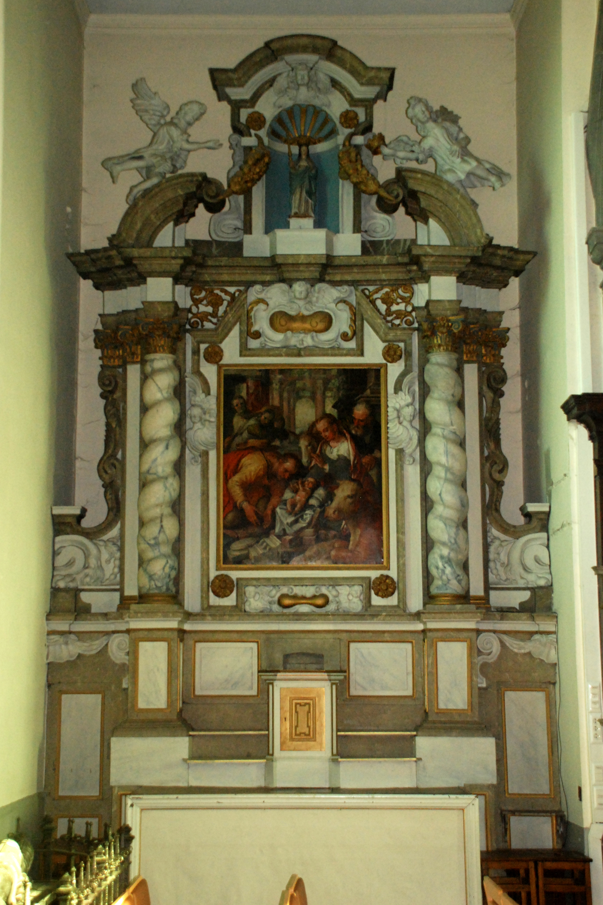 Belgique - Brabant wallon - Église de Court-Saint-Étienne